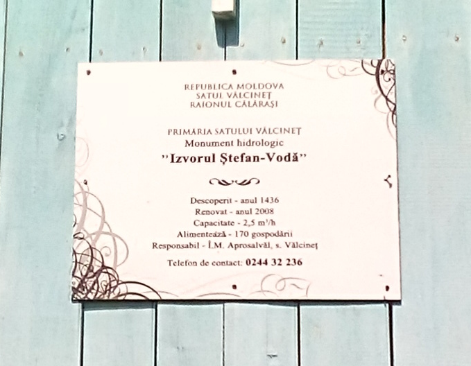 Panoul informativ instalat deasupra izvorului lui Ștefan cel Mare, monument al naturii amplasat în raionul Călărași, la est de satul Vălcineț (cod MD-CL-mn.B-005) B-005